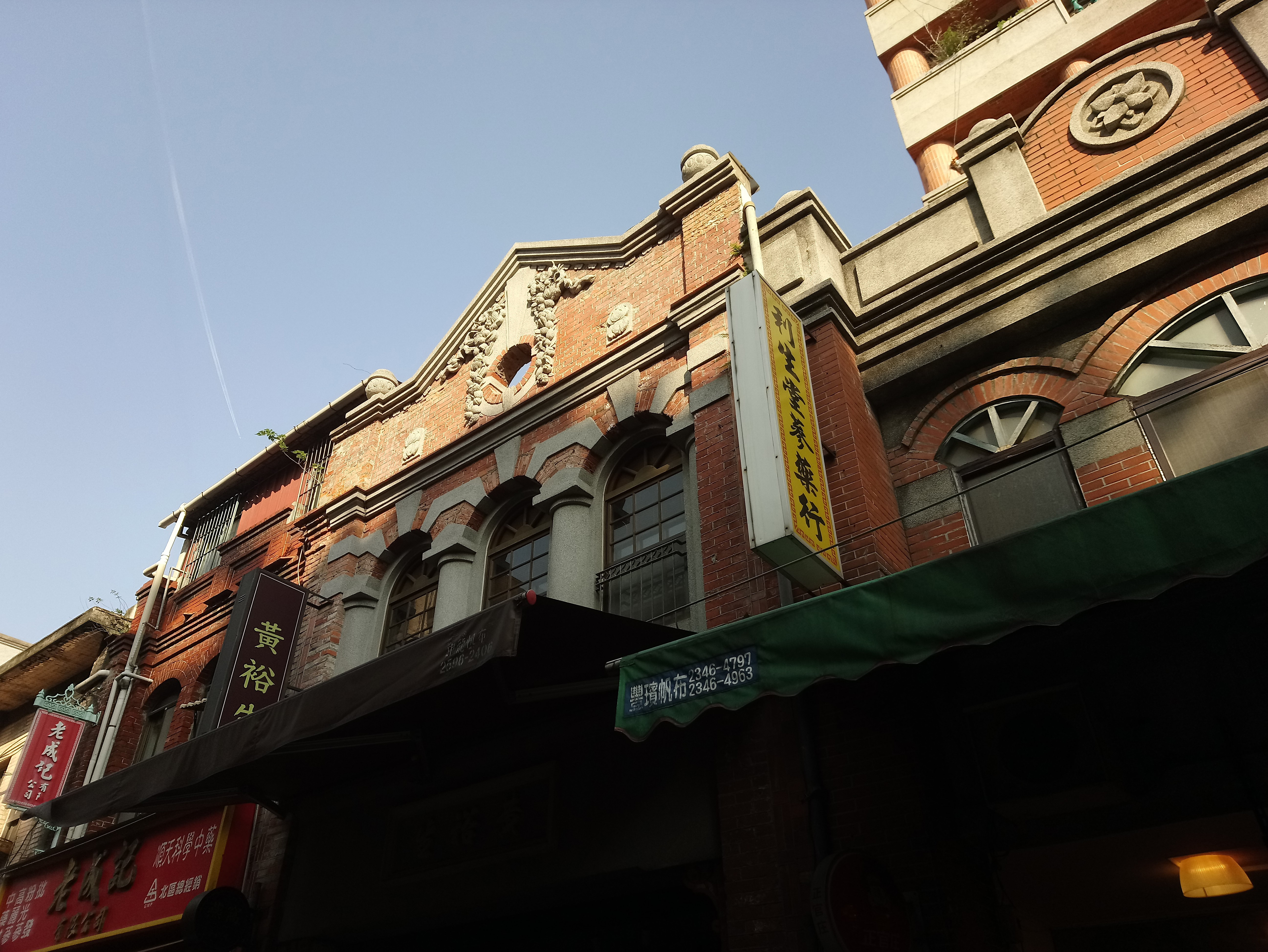 黃裕生藥行,臺北市大同區延平次分區永樂里